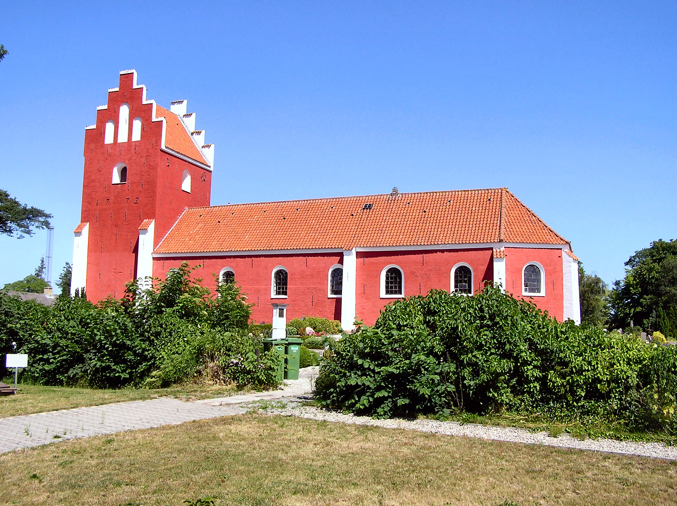 Byrum Kirke, Læsø